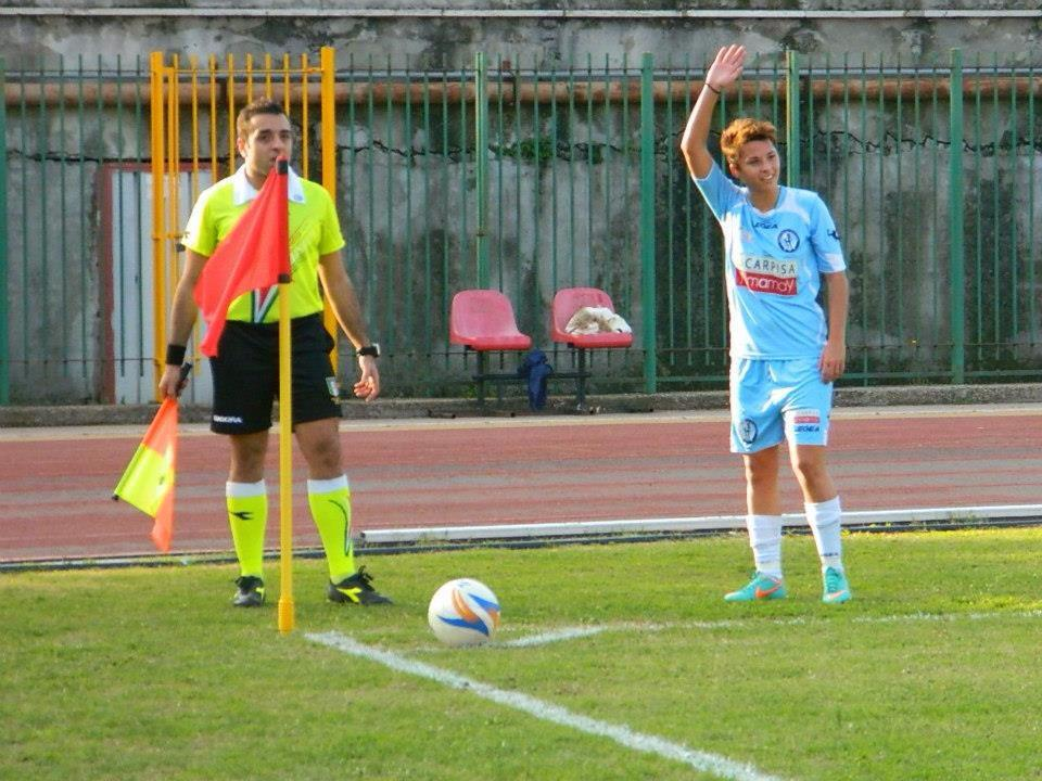 Valentina Giacinti con la maglia del Napoli Calcio Femminile